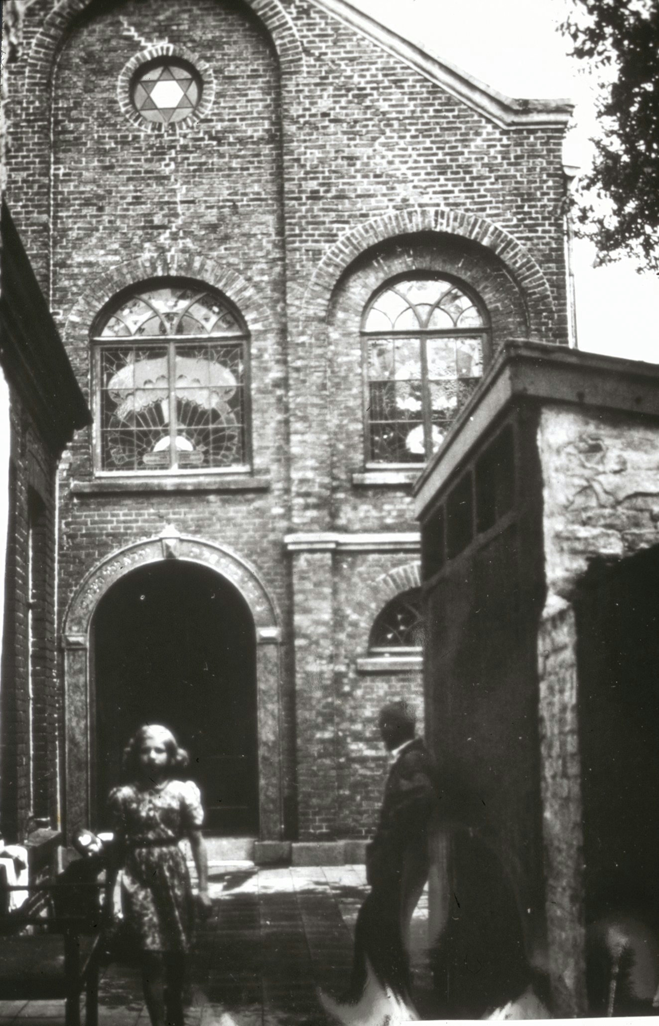 Synagoge: Exterieur VOORGEVEL